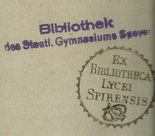 Stempel der Lyzeumsbibliothek Speyer